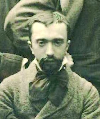 Charles Diehl sur une photo de groupe (détail). Promotion littéraire de l’École Normale Supérieure (rue d'Ulm, Paris (5e arrond.). Photographe Pierre Petit. Fonds photographique de l'école : PHO D/2/1878/5.